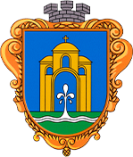 Герб Броварів